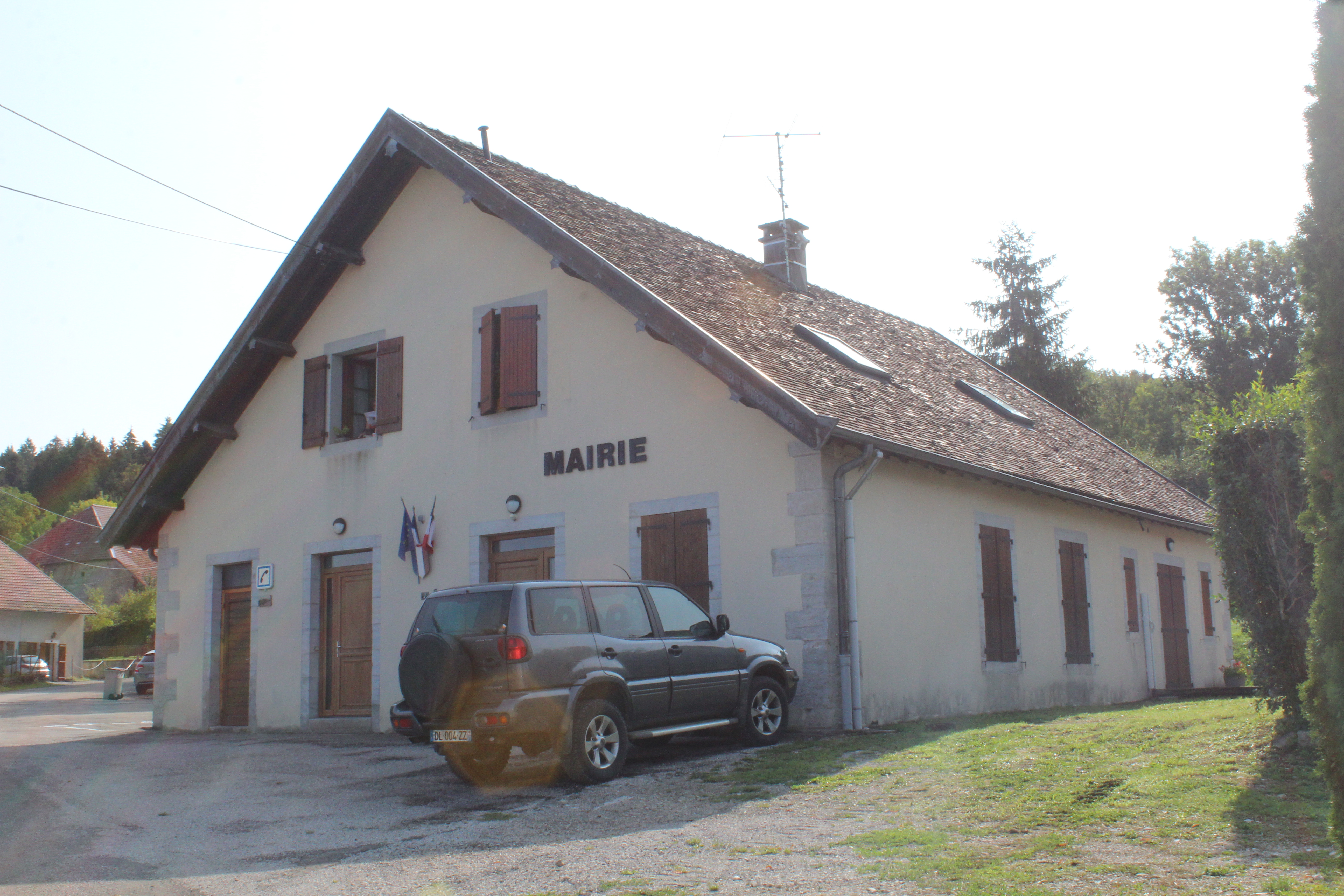 Mairie du Larderet.